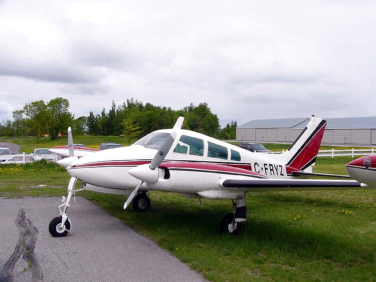 Cessna 310J